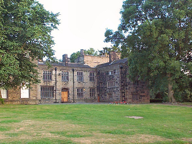 Bolling Hall